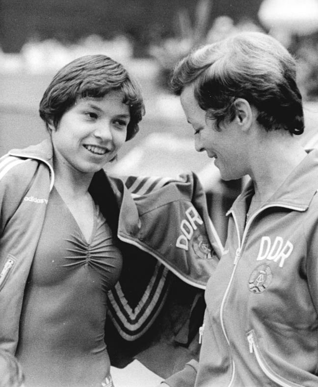 Maxi Gnauck, Hannelore Sauer ADN-ZB Kluge 11.5.84 Bez. Rostock: Turn-Länderkampf der Frauen DDR-UVR am 12.-13.5.84 in Wismar -An der Spitze des DDR-Aufgebotes steht Barren-Weltmeisterin Maxi Gnauck (l.) vom SC Dynamo Berlin. Rechts Verbandstrainerin Hannelore Sauer. (Als Arbeitsmaterial)